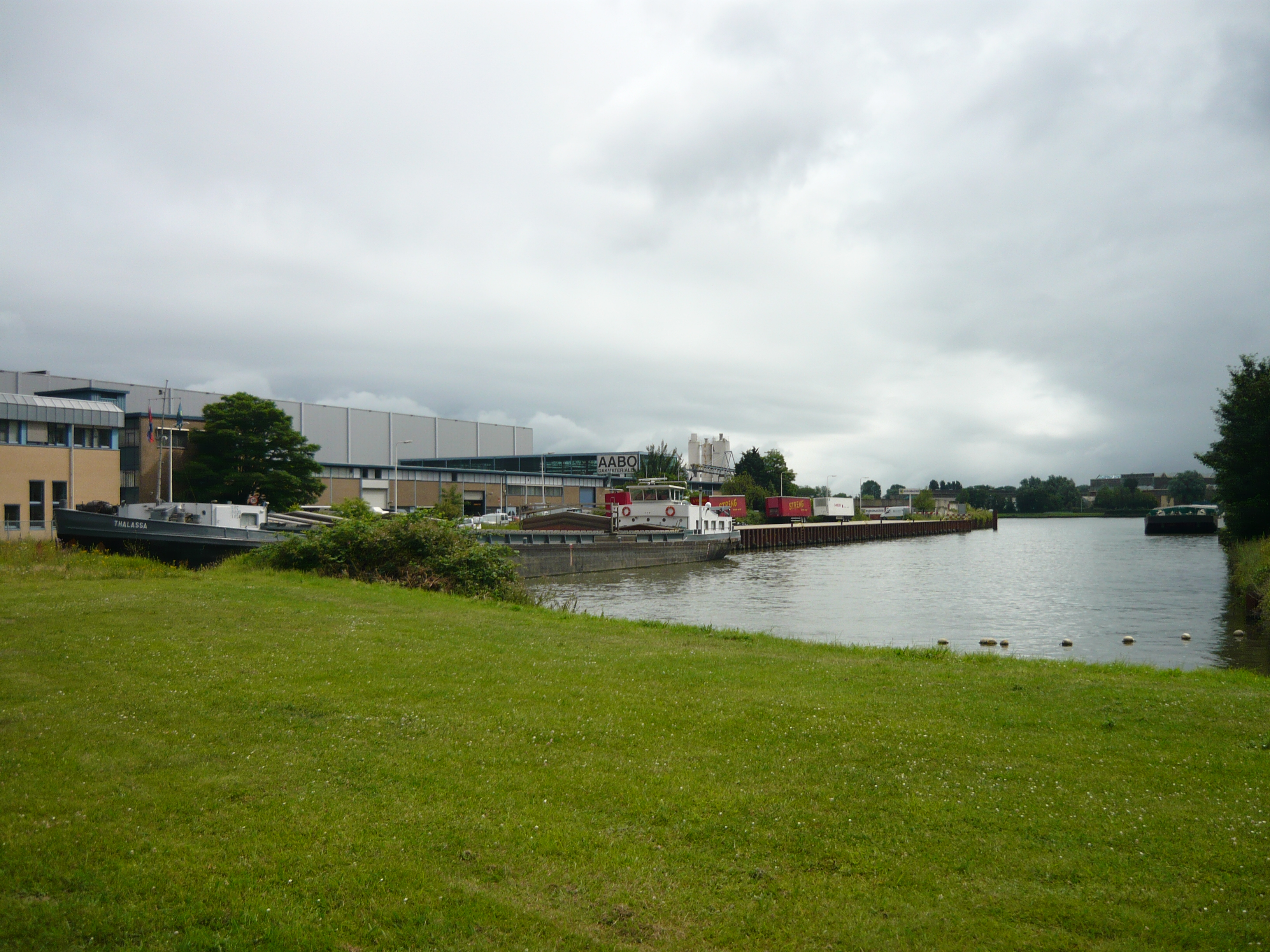 De Kernhaven in de Nederlandse stad Utrecht, specifiek een insteekhaven van het Amsterdam-Rijnkanaal ter hoogte van Lage Weide.